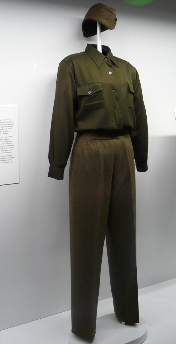 Marlene Dietrichs Uniform, die sie während der Truppenbetreuung der US-amerikanischen Armeeangehörigen im Zweiten Weltkrieg trug. Exponat des Militärhistorischen Museums Dresden.